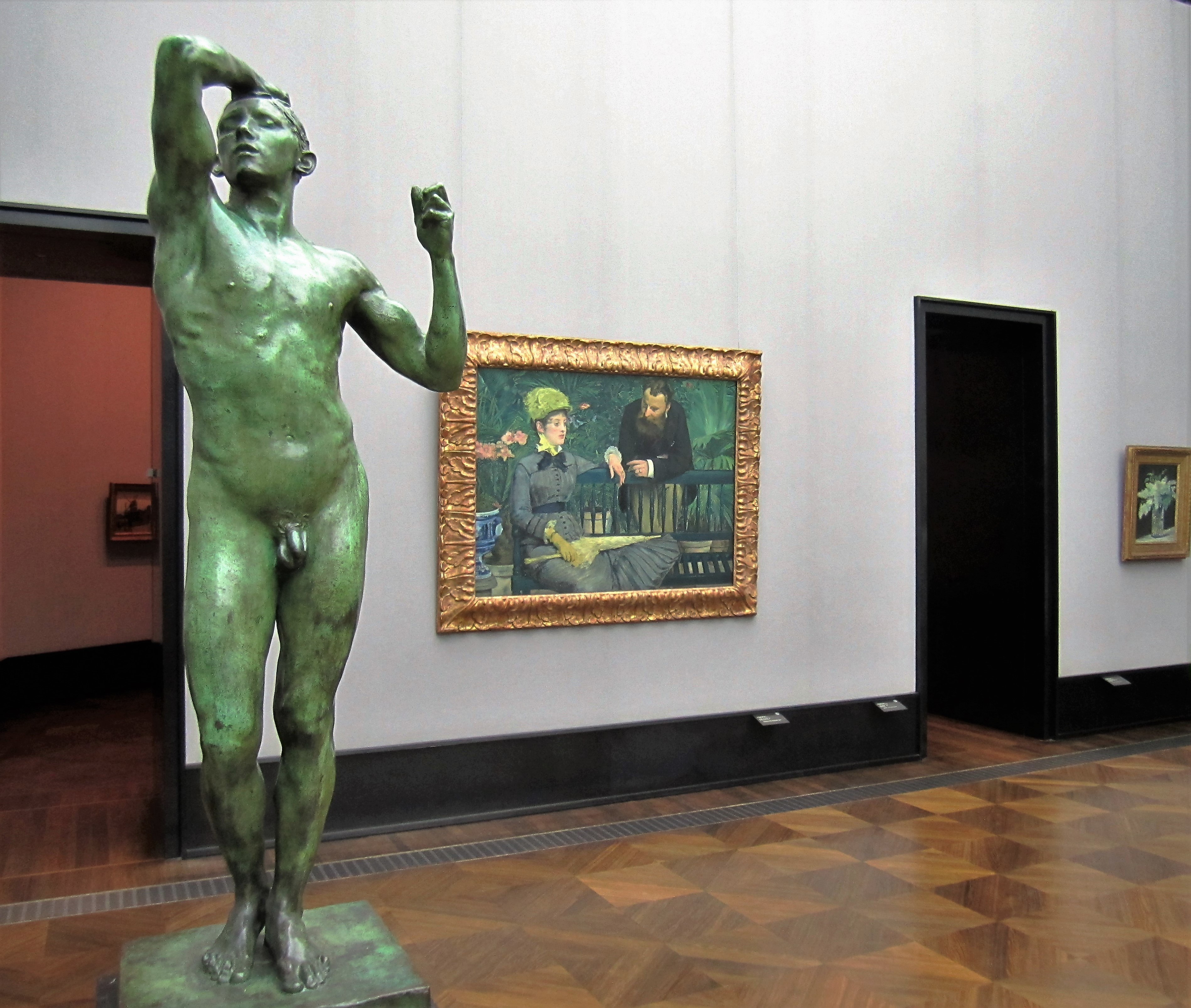 Alte Nationalgalerie Berlin. Ausstellungsraum mit der Skulptur „Das Eherne Zeitalter“ (1875/76) von Auguste Rodin. Im Hintergrund das Gemälde „Im Wintergarten“ (1879) von Édouard Manet.